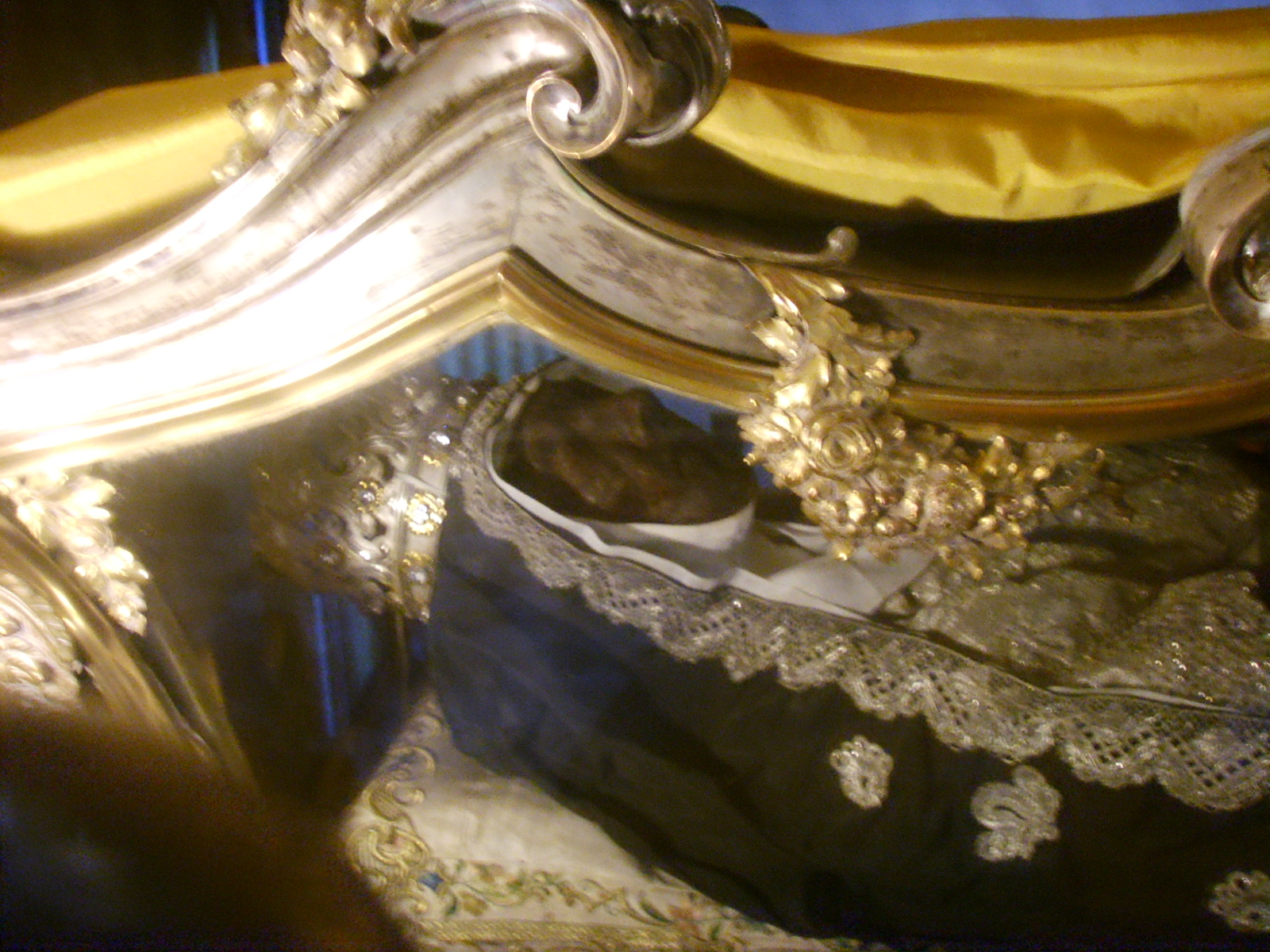 Basilica_di_Santa_Caterina_de'_Ricci